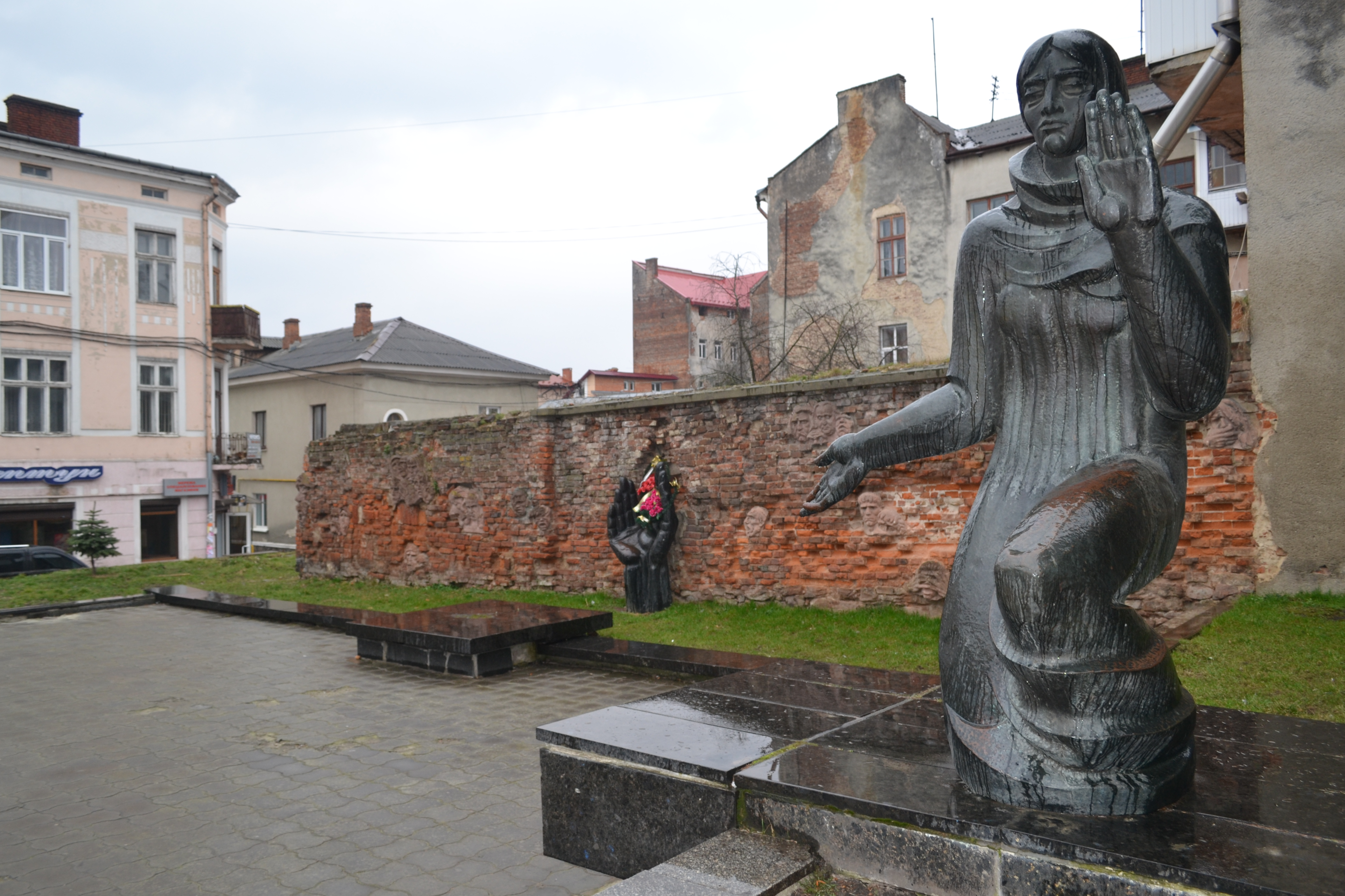 Місце страти мирних громадян німецько-фашистськими загарбниками (пам., ск. В.Борисенко, В.Подольський, арх. Є.Хомик, 1974, бронза)., Дрогобич, вул. Ковальська